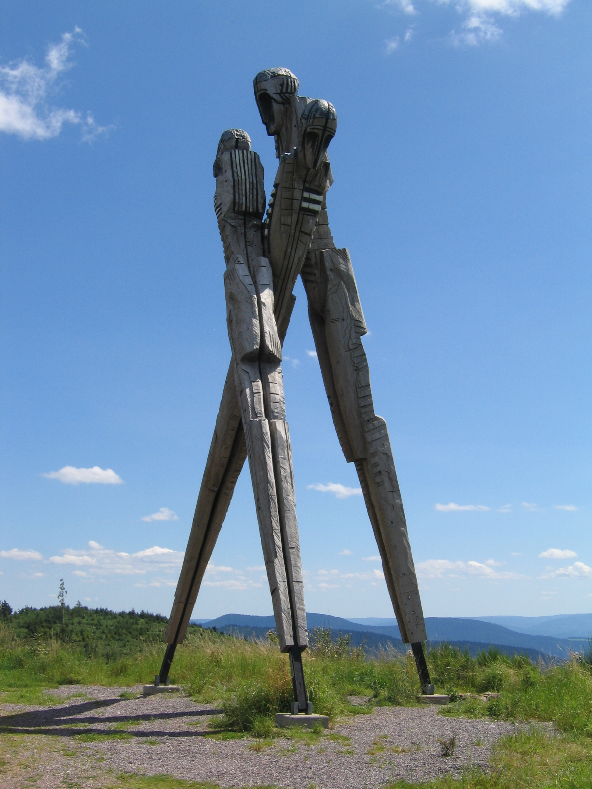 Lothardenkmal am Siedigkopf im Nordschwarzwald.